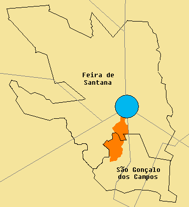 Mapa do Centro Industrial de Subaé (em laranja), em relação aos municípios de Feira de Santana (ao norte), São Gonçalo dos Campos (ao sul) e à Região Central de Feira de Santana (em azul). Rodovias e avenidas estão representadas em cinza.